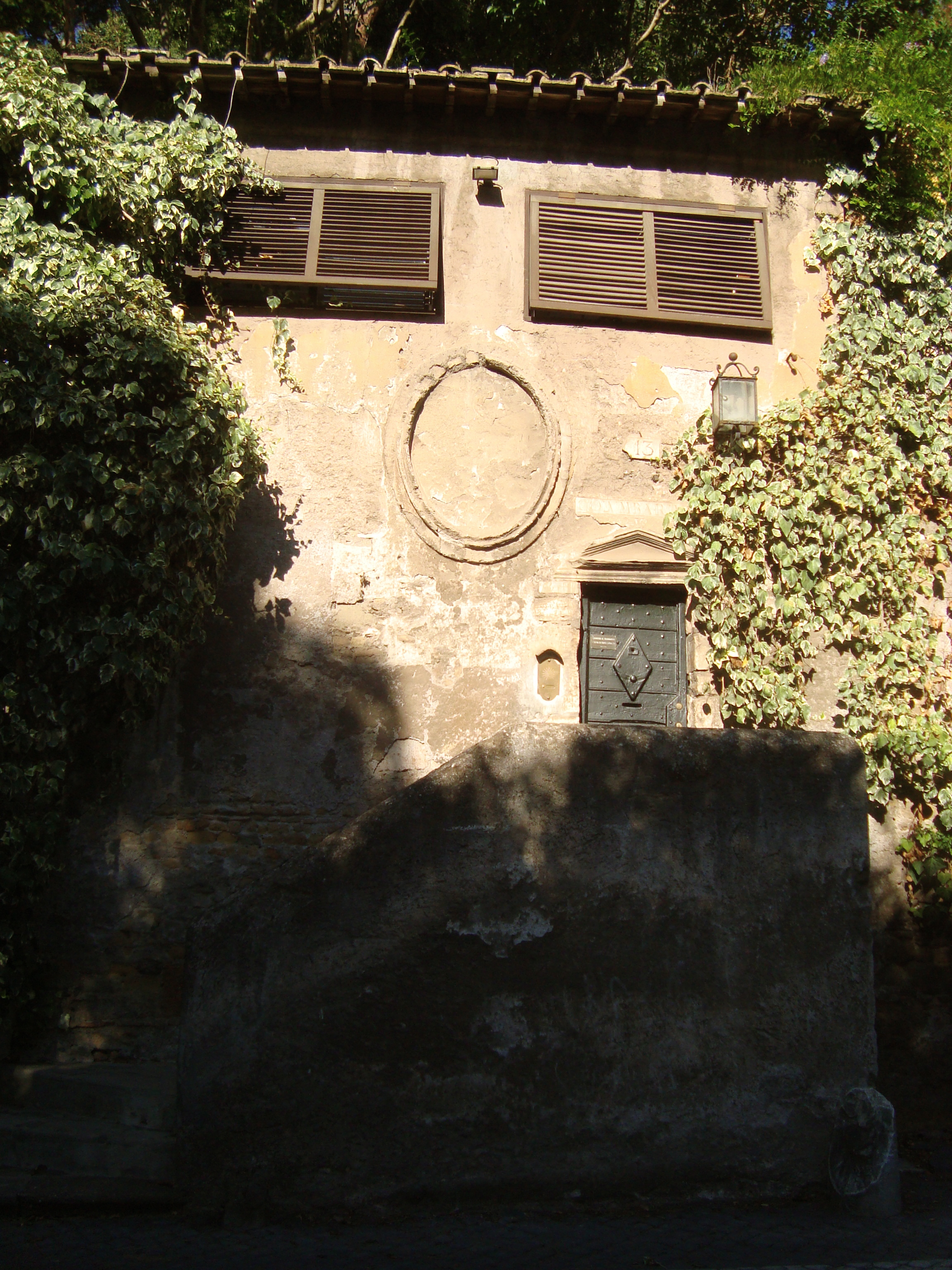 Roma, via Appia antica 13: ingresso ai colombari di Vigna Codini